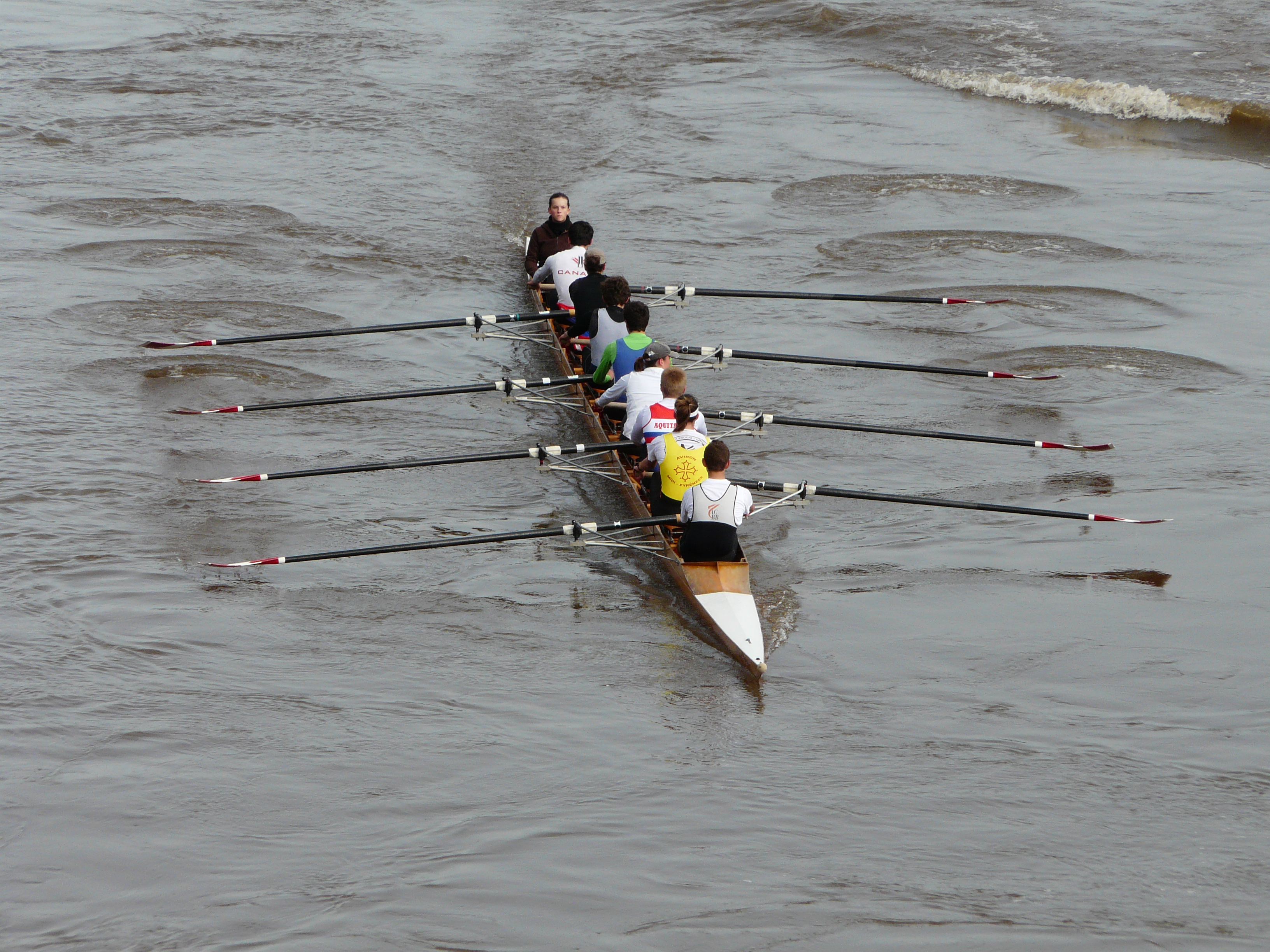 Entraînement d'aviron sur la Dordogne à Bergerac, Dordogne, France (8 de pointe barré).